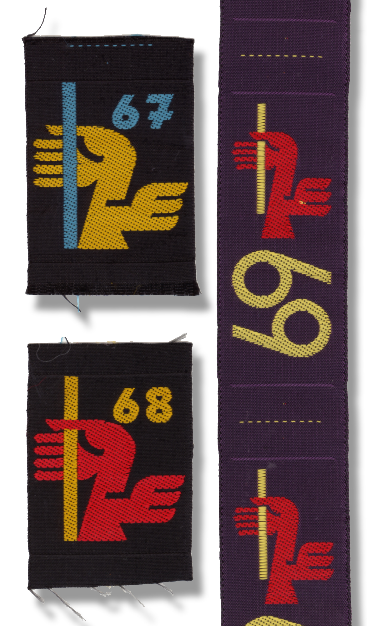 Jahresaktionsabzeichen der Deutschen Pfadfinderschaft Sankt Georg von 1967, 1968 und 1969.